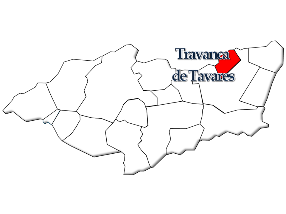 Mapa das freguesias